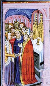 Eleonora Akvitánská a Ludvík VII. - svatba